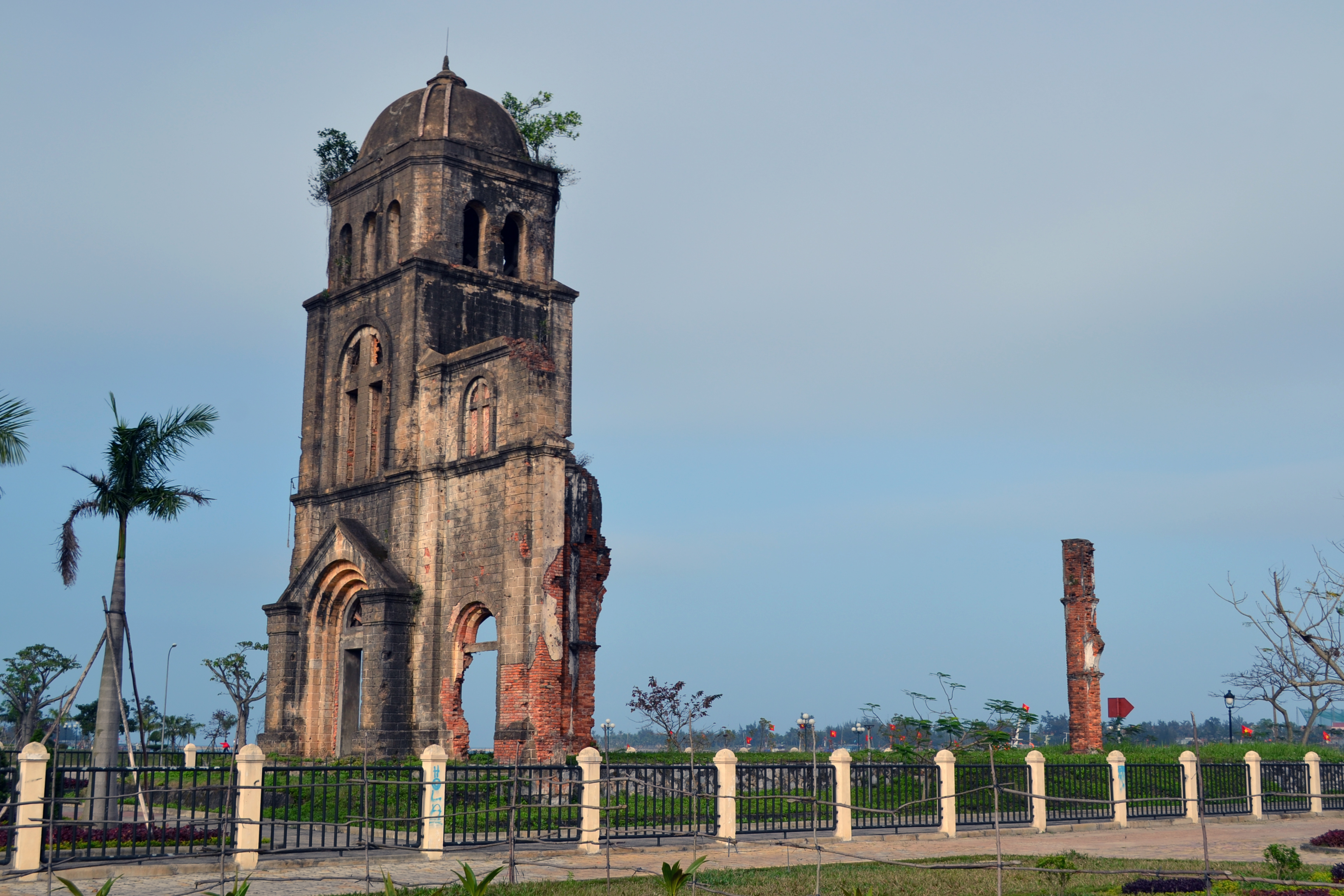 Tam Toa Church in Dong Hoi City, Quang Binh Province.